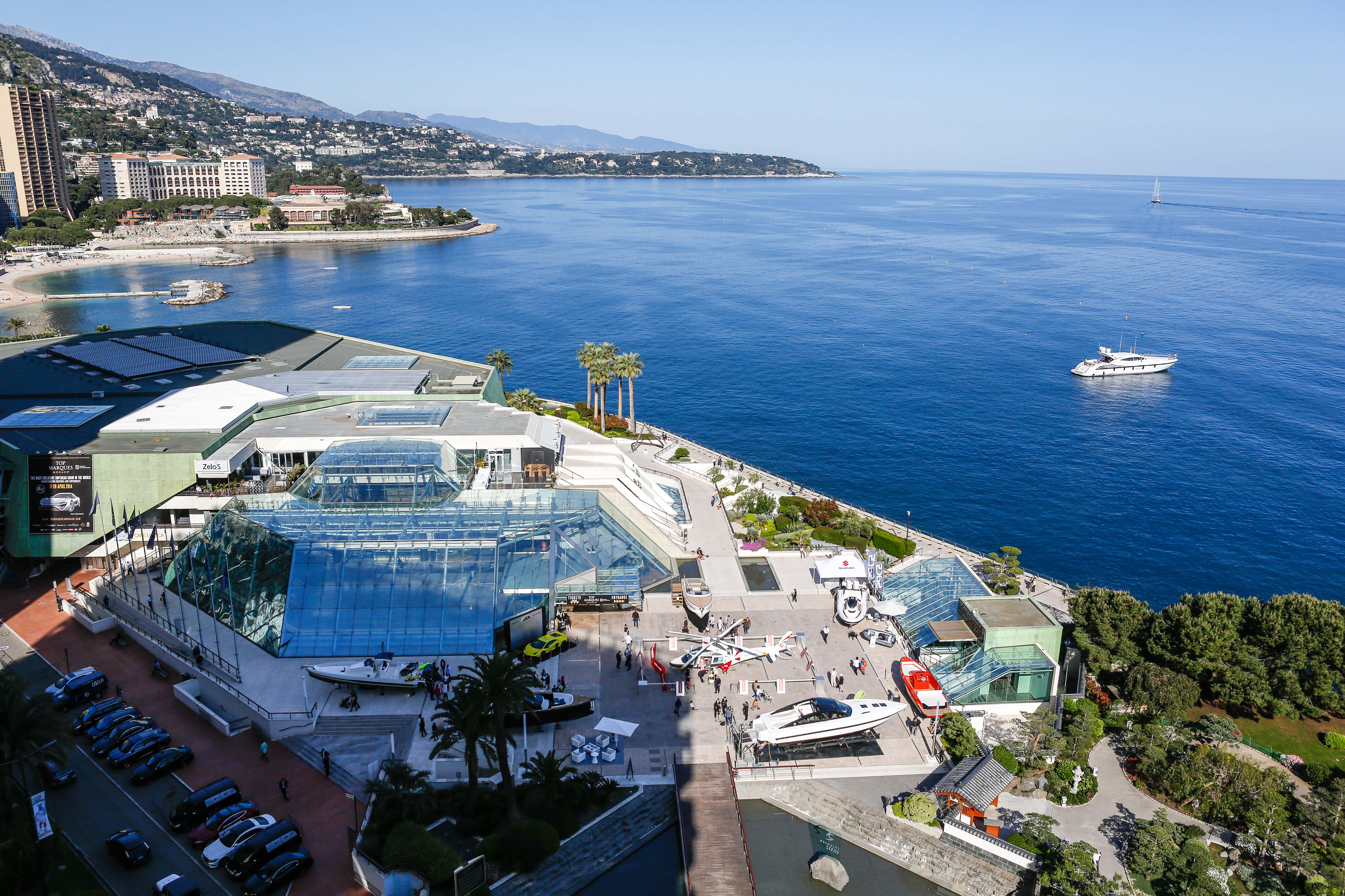 salon du luxe Top Marques Monaco, au Grimaldi Forum Monaco